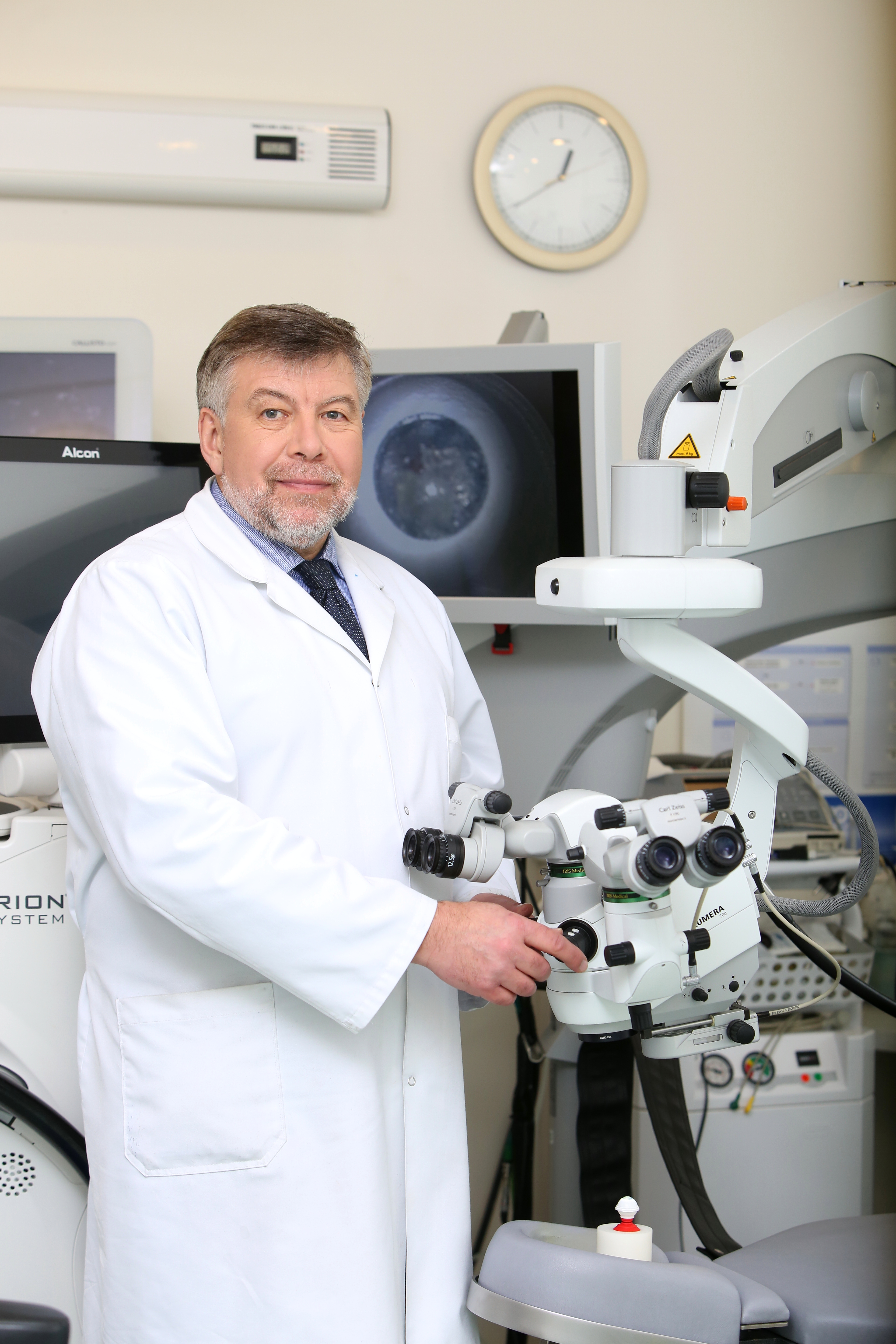 Igors Solomatins